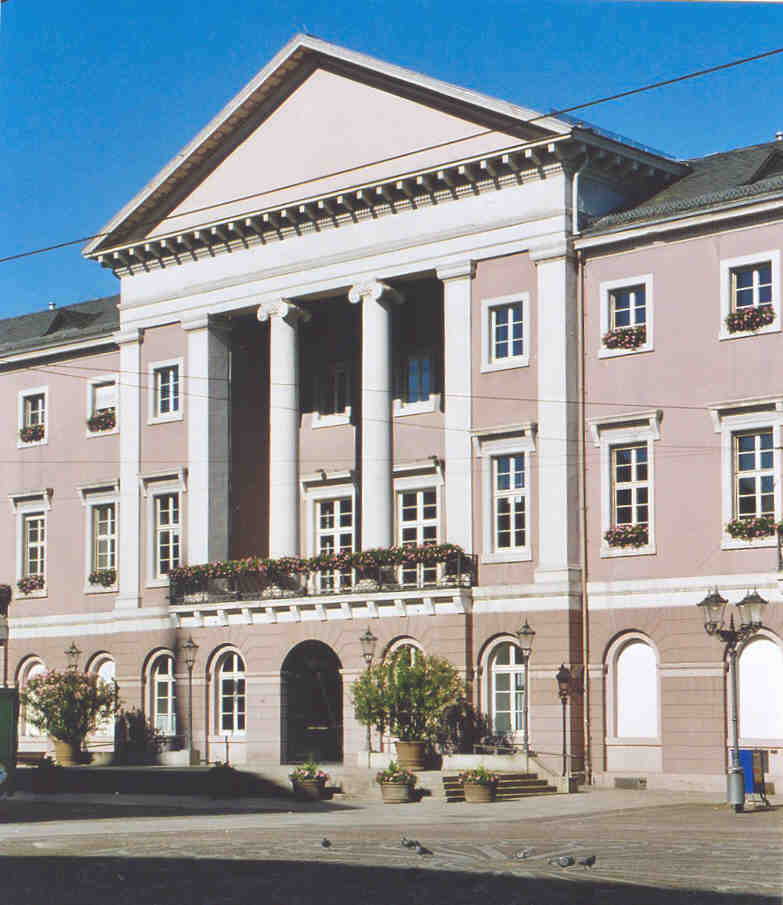 Friedrich Weinbrenner : Rathaus von Karlsruhe, erbaut 1805/06 und 1821-25. Hier Blick auf die Mittelpartie der Marktplatzseite, eine reizvolle Interpretation der antiken Tempelfront (Säulen-Portikus).